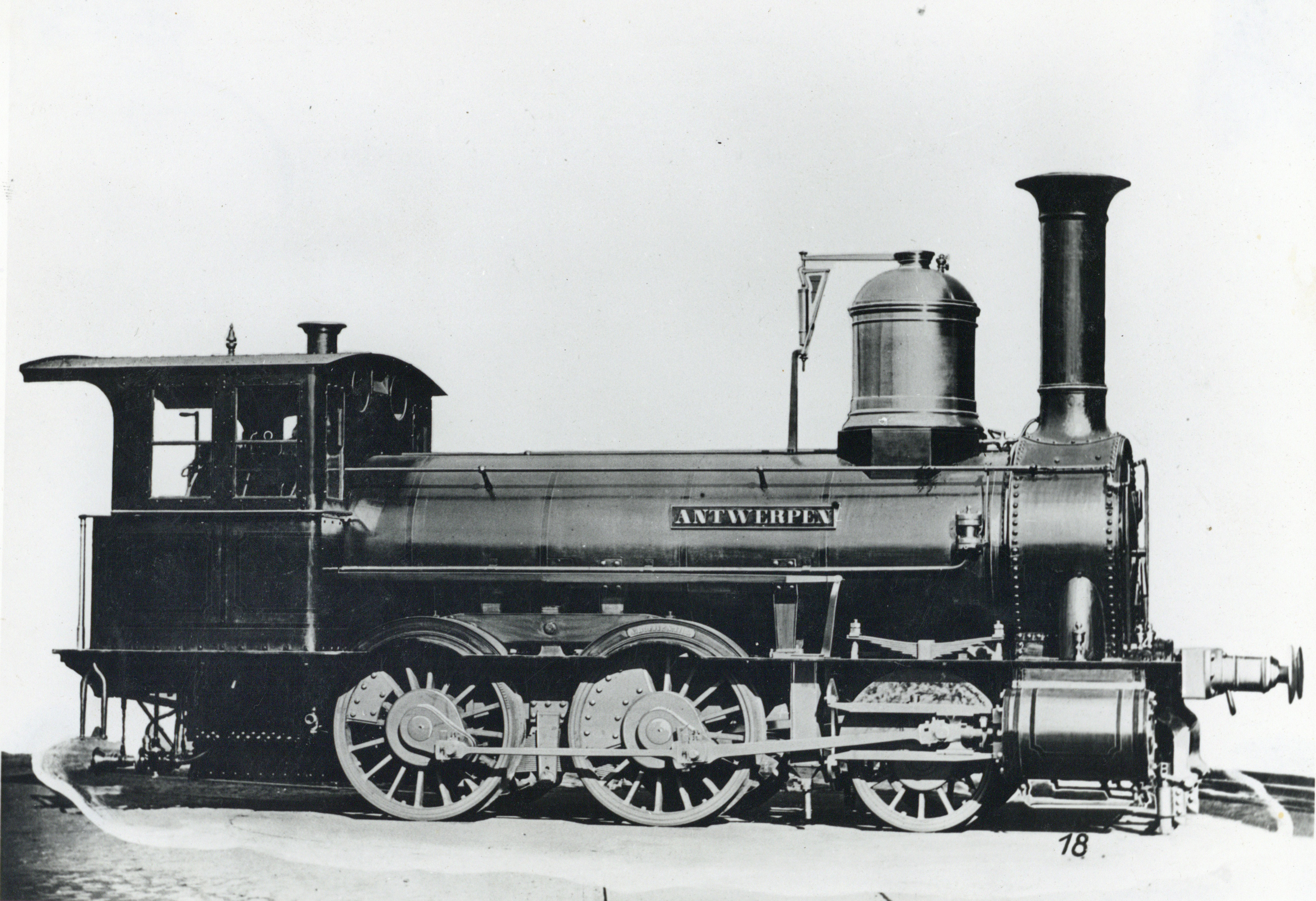 Afbeelding van de stoomlocomotief "Antwerpen" van de A.M. (Aken-Maastrichtse Spoorweg-Maatschappij).